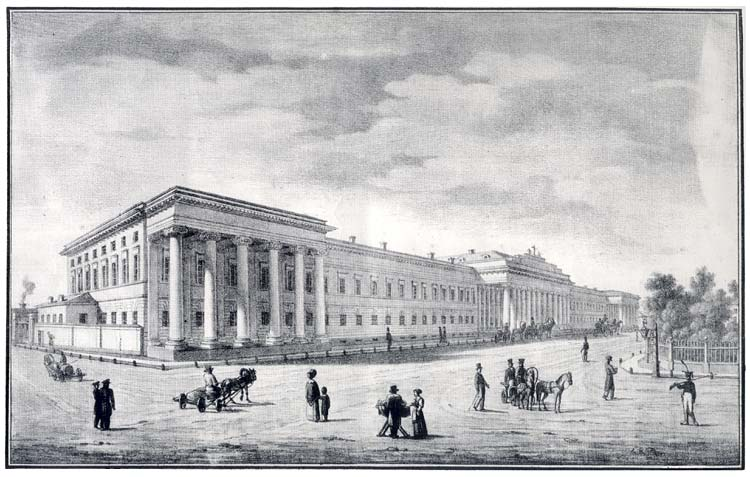 Императорский университет. Из альбома: Перспективные виды губернского города Казани, рисованы с натуры, литографированы и изданы Василием Туриным. — Москва, 1834.